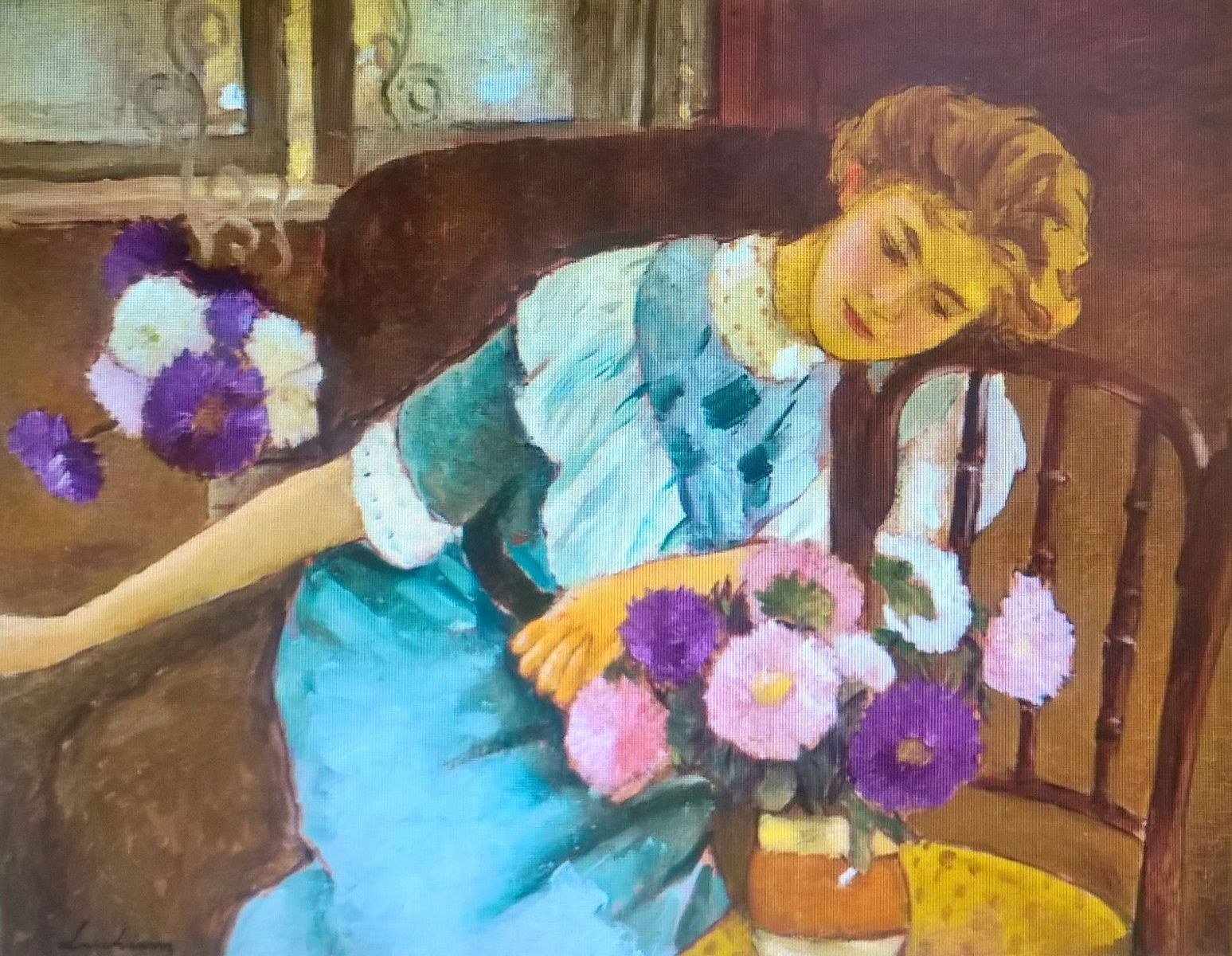 Ştefan Luchian - Lorica cu crizanteme, ulei pe pânză, 60x76,5 cm, Muzeul National de Artă al României din Bucureşti